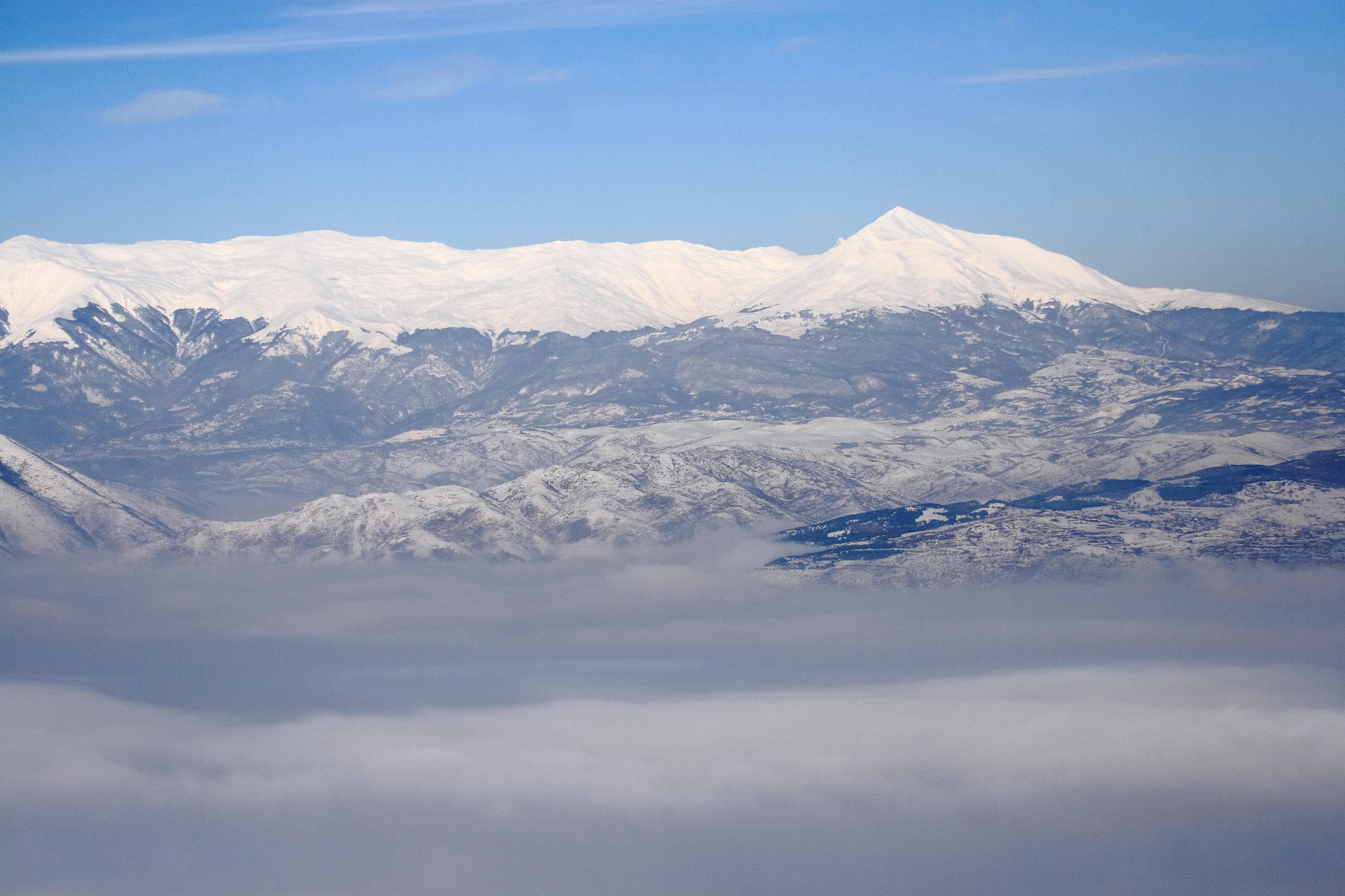 Sharplaninski greben